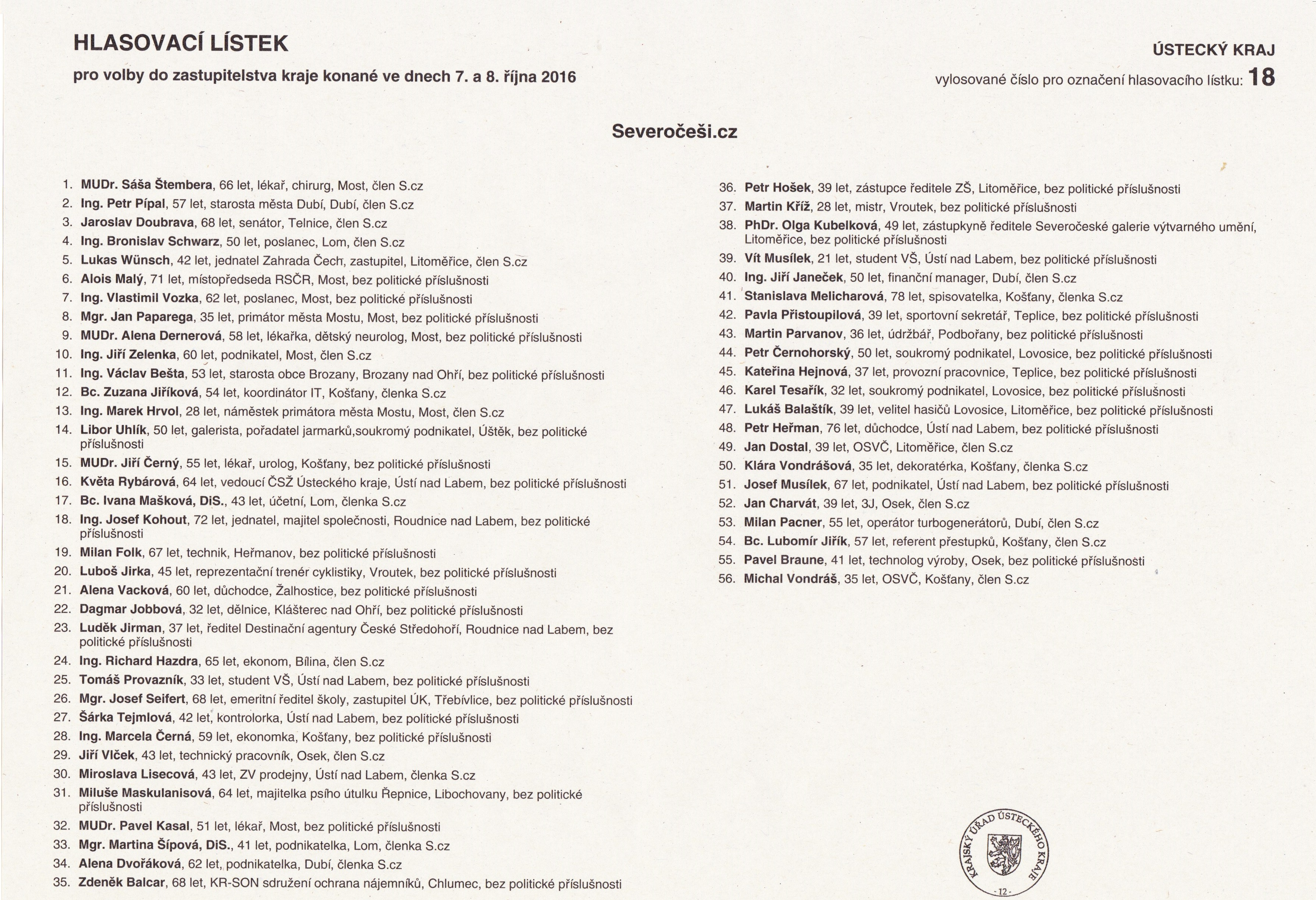 Neplatný hlasovací lístek Severočeši.cz pro krajské volby 2016 - Ústecký kraj.